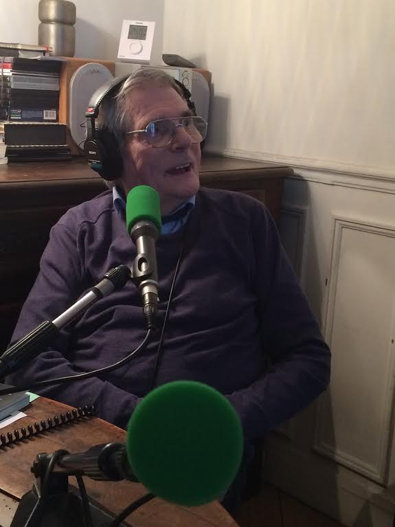 Jean-Christophe Averty interviewé par Noël Herpe, fin mars 2015.